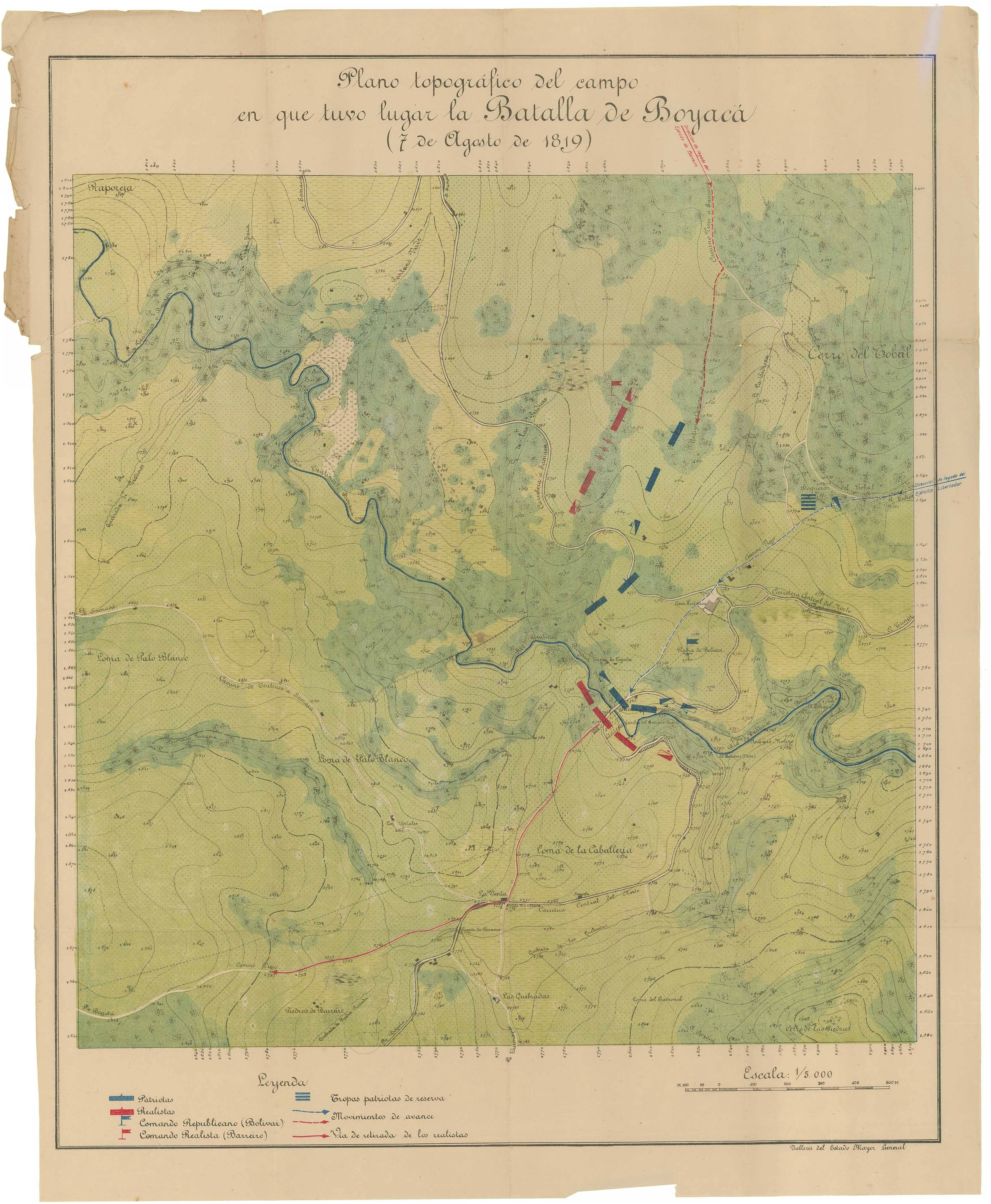 Plan topographique du champ de bataille de la bataille de Boyacá (7 août 1819)